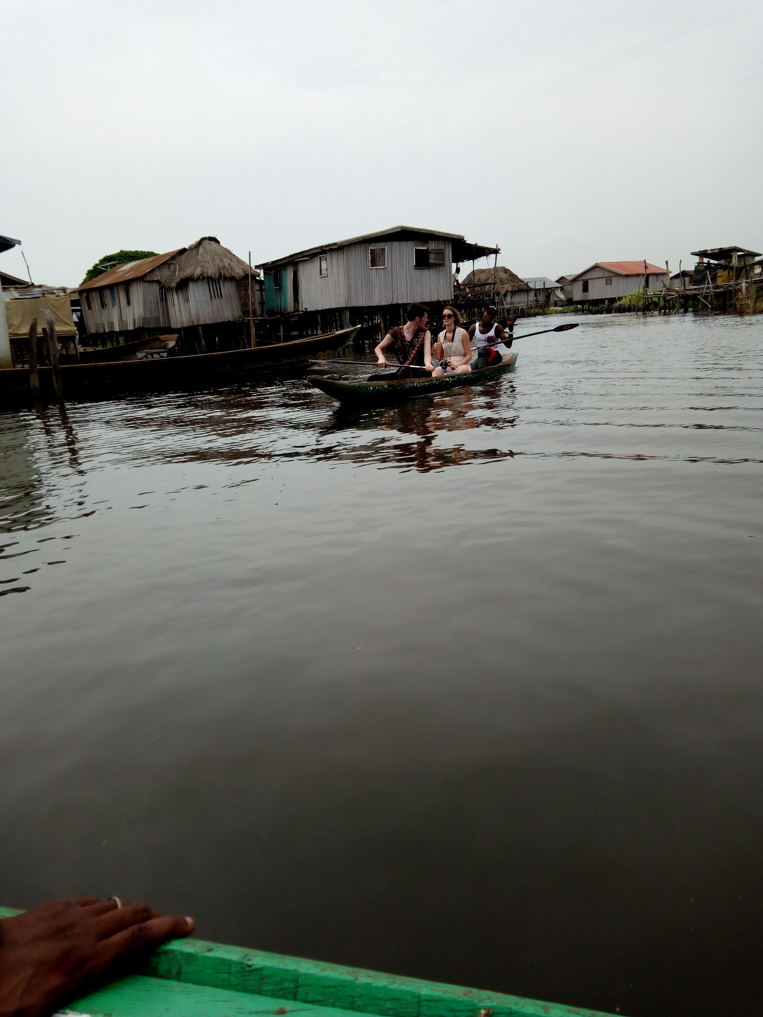 tourisme par pirogue à Ganvié au Bénin This is an image with the theme "Africa on the Move or Transport" from: Benin